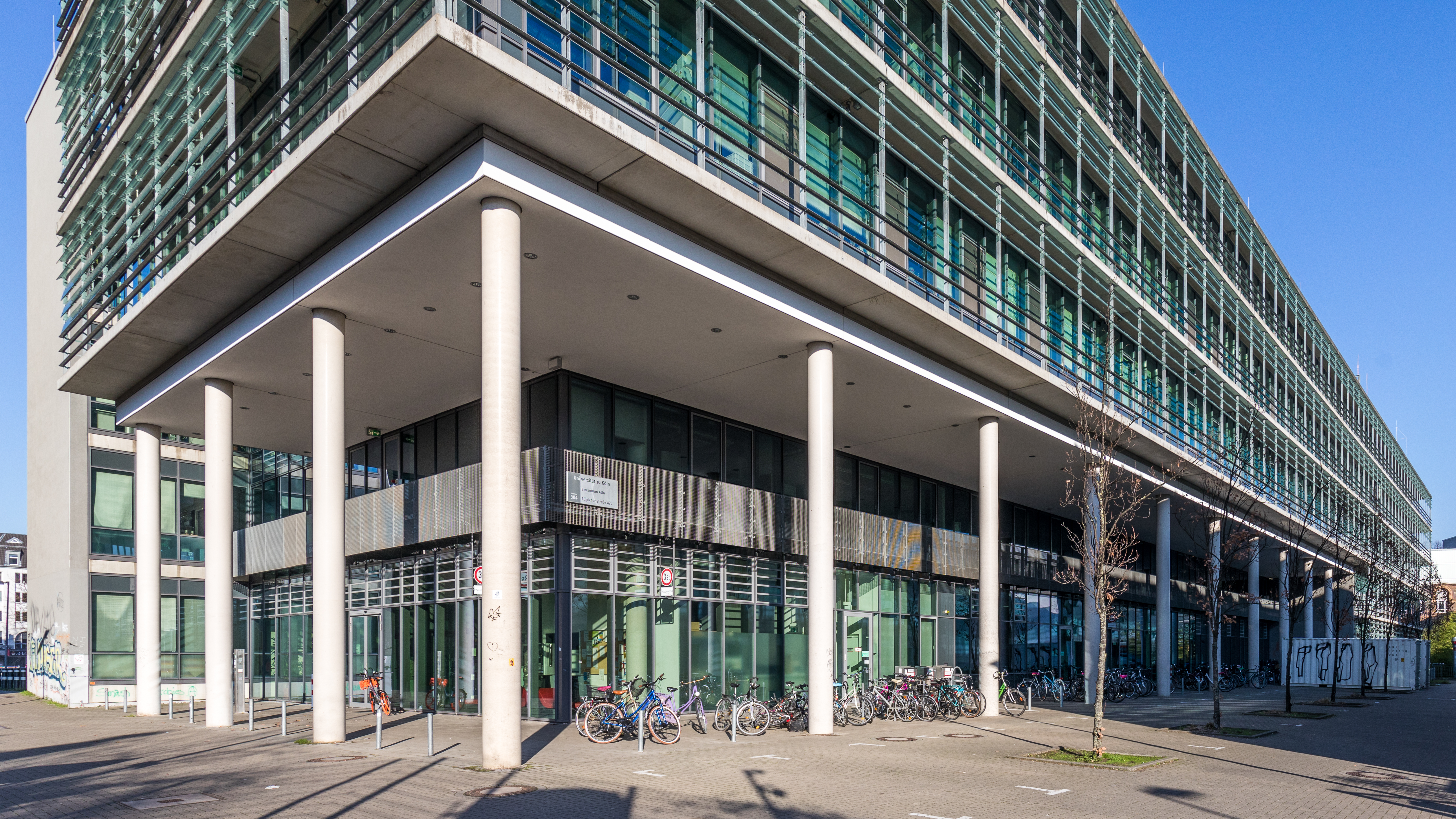 Biozentrum, Universität zu Köln. Gebäude 304, Zülpicher Straße 47b